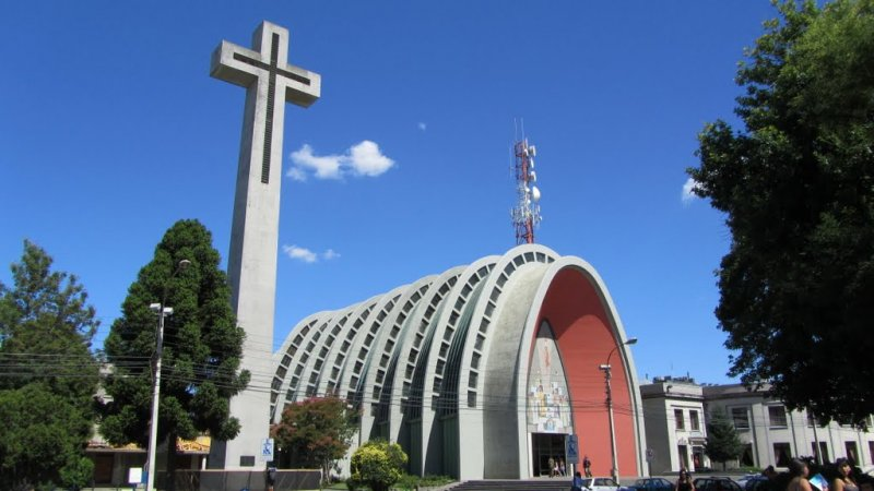 Ubicado frente a la Plaza de Armas de la ciudad.